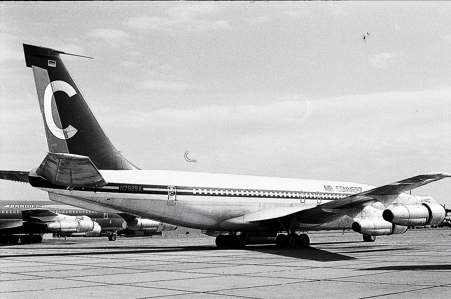 Boeing 707-138B (Air Commerz) N792SA / ex D-ADAQ, Marana 28.1.1975; F110-01A-b